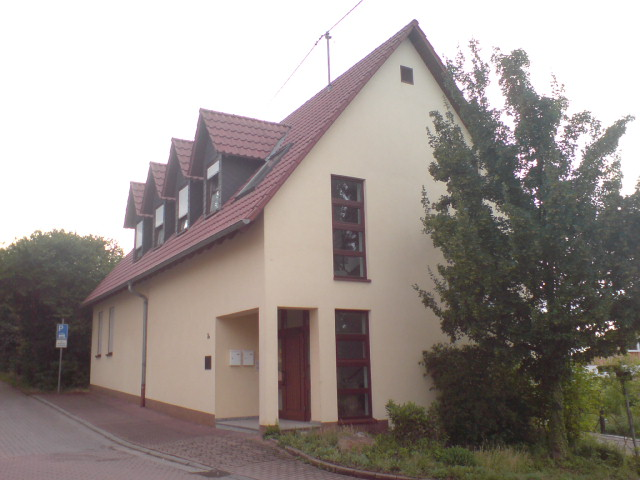 Mennonitische Forschungsstelle in Bolanden-Weierhof. Am Hollerbrunnen 2a, Bolanden-Weierhof, Rheinland-Pfalz, Deutschland / Germany